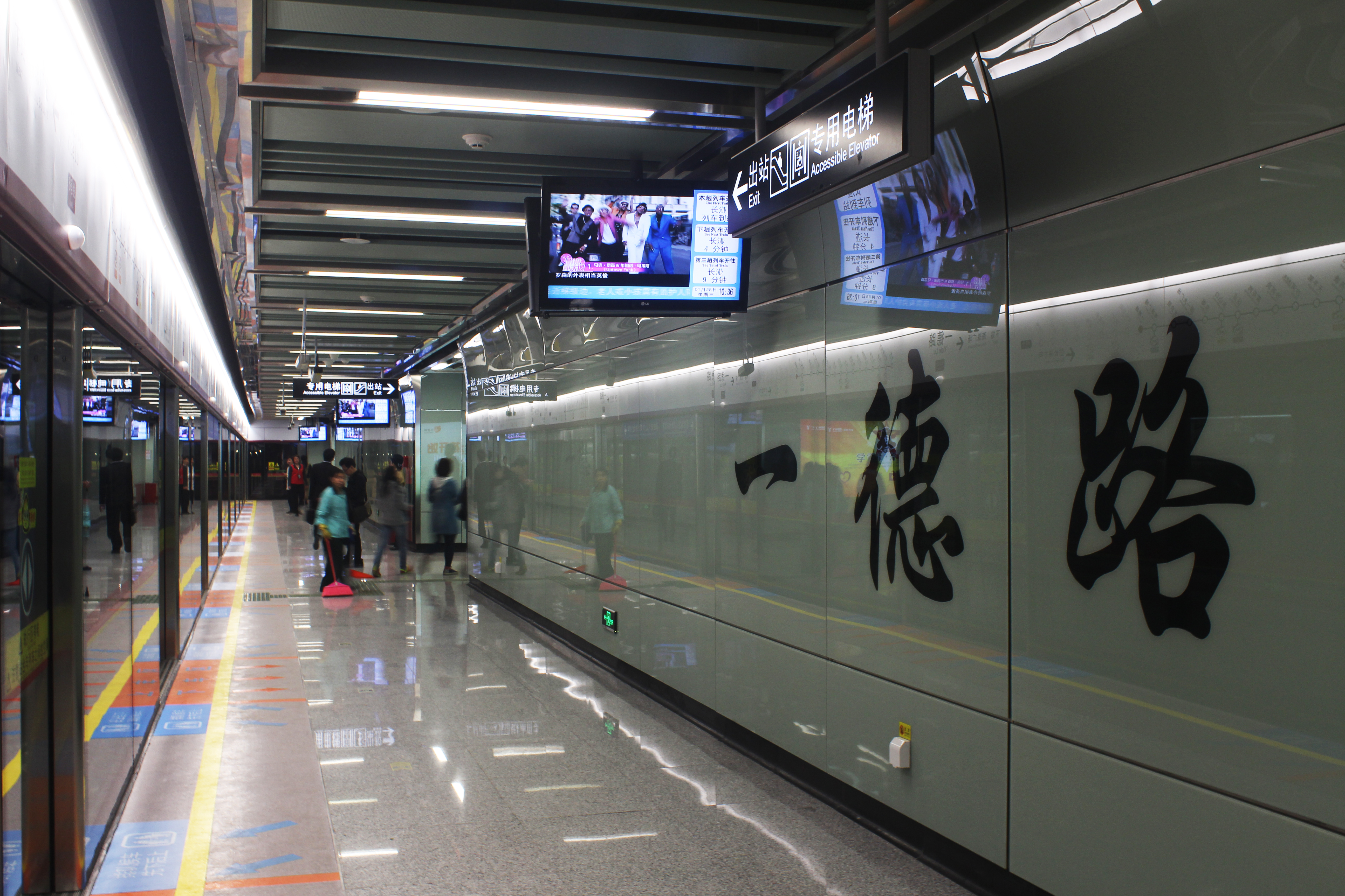 广州地铁一德路站月台（香雪方）